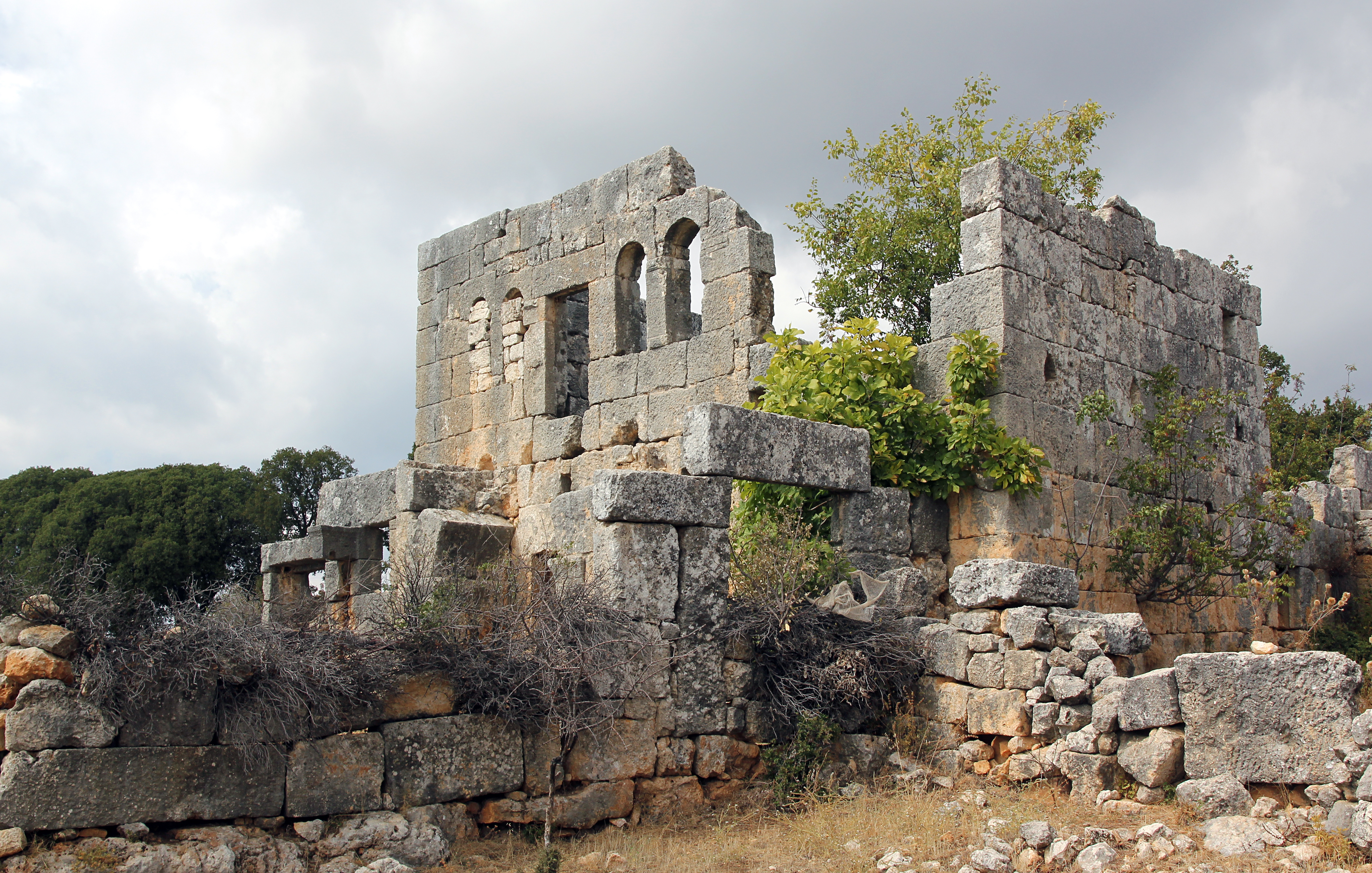 Gökkale, römische Villa mit Wirtschaftsgebäuden im Rauhen Kilikien, Südtürkei, Blick von Südosten